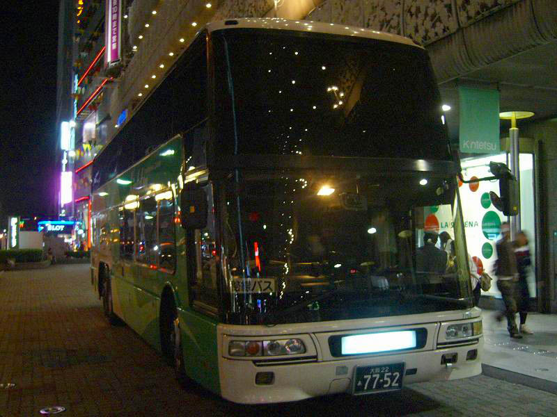 登録番号 大阪22か77-52 近鉄バス所属 夜行用車両 （各系統で共通運用） 三菱ふそう・エアロキング MU612TX 2007年4月23日 あべの橋バスステーションにて撮影 撮影者 Tokatsu kokubu